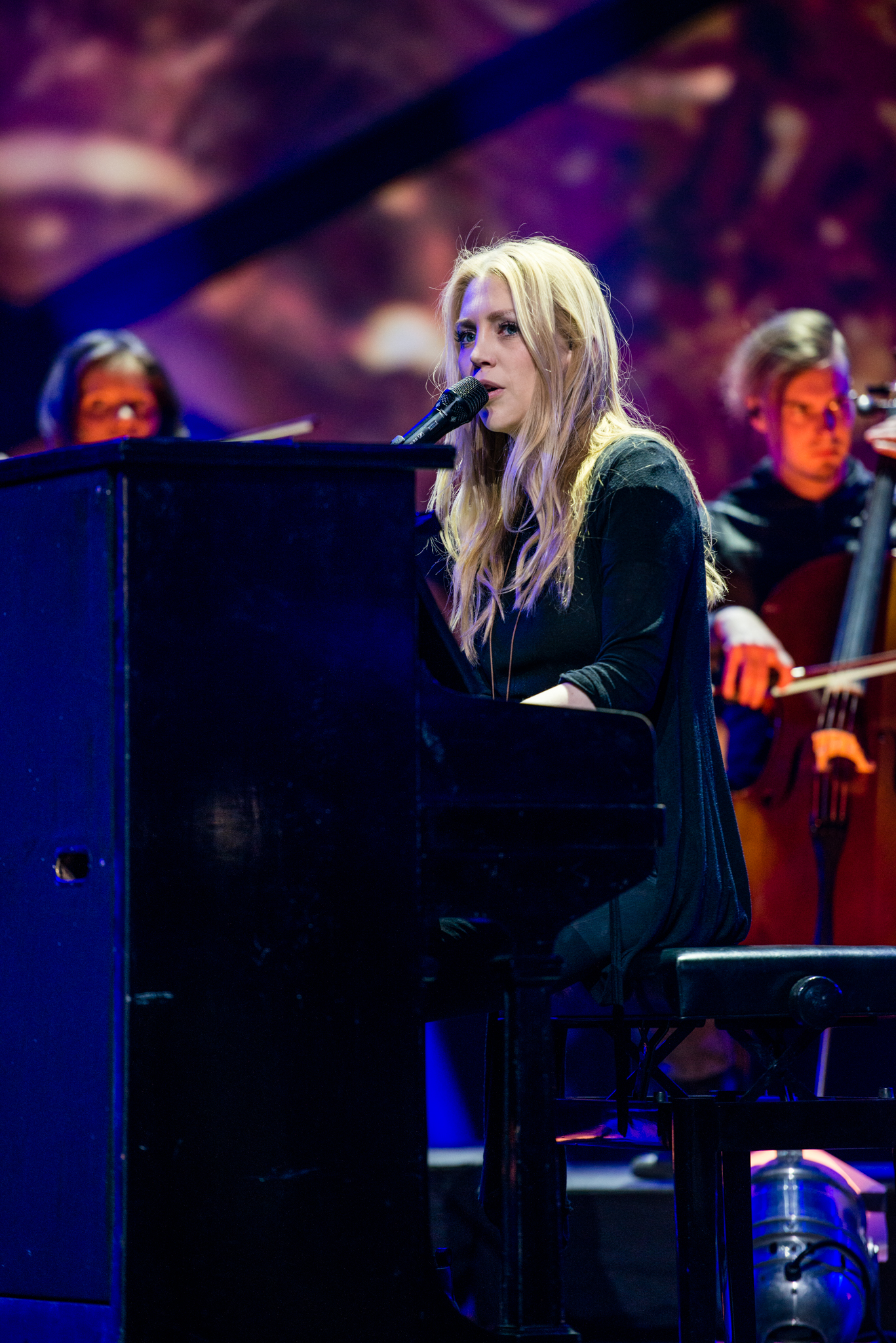 'Eurovision Song Contest 2015 - Unser Song für Österreich': 'Alexa Feser'